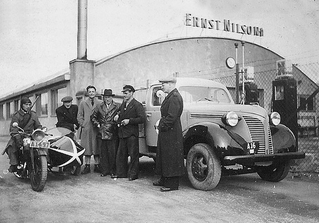 Ernst Nilson (Bilverkstaden på Ringvägen, Södermalm i Stockholm, uppförd 1939-40)